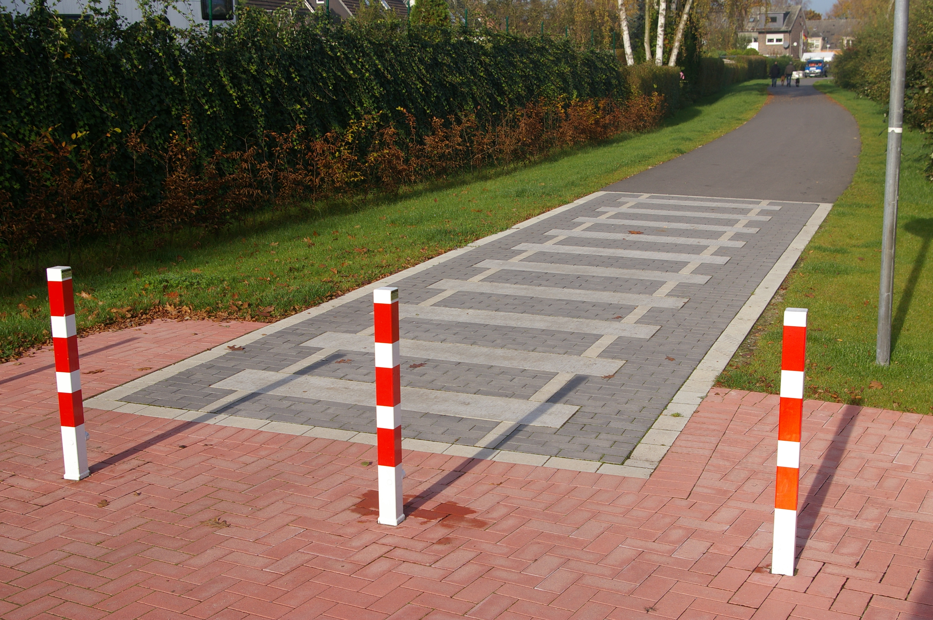 Im Fußweg angedeutete Bahnschwellen erinnern an die ehemalige Hafenbahn von Fürst Leopold mitten durch Hervest Dorsten. Ich glaube am mittleren Poller hat grad ein Hund (ja, die hinten im Bild!) drangepuschert..